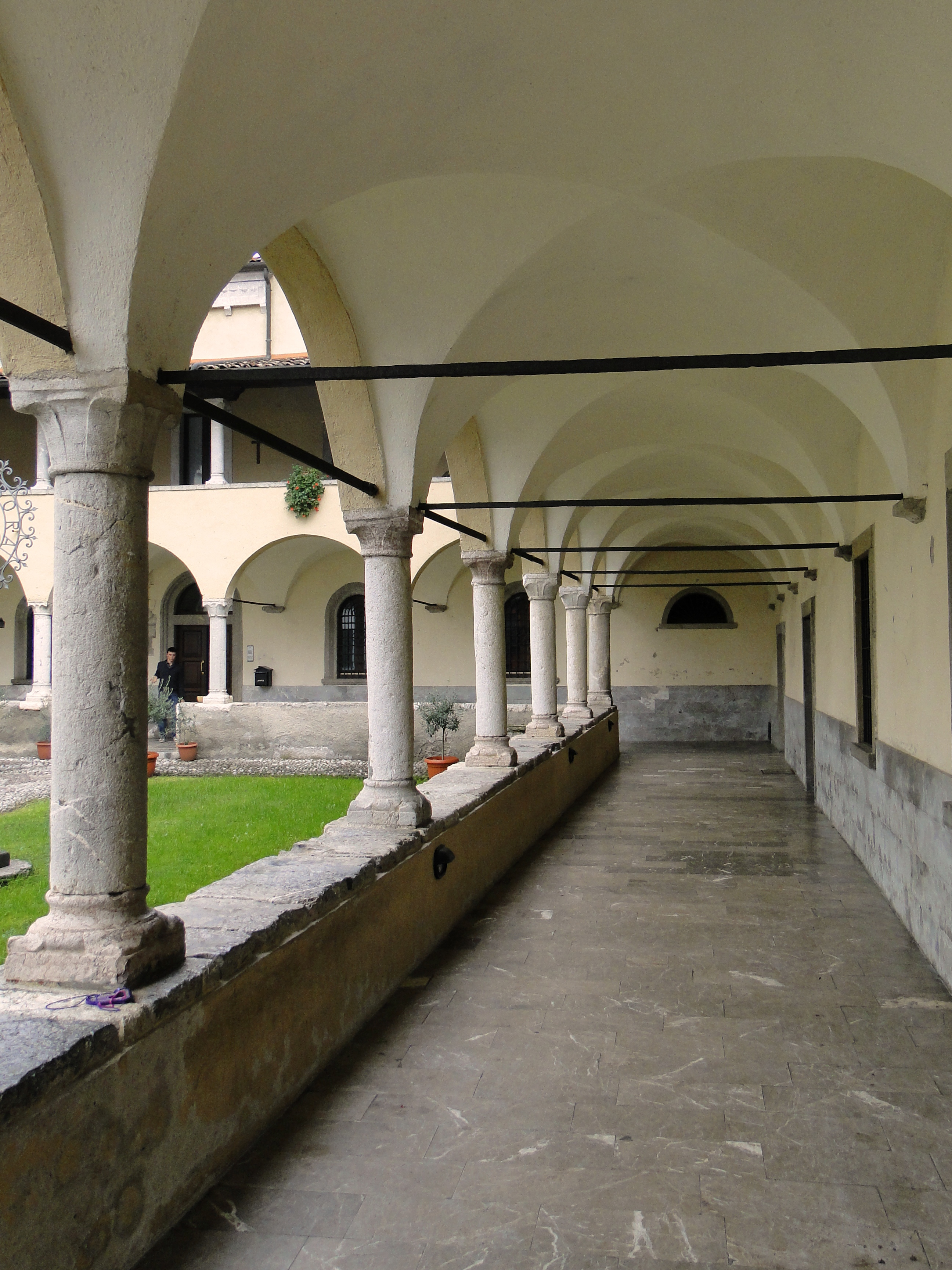 Abbazia san Benedetto in Vallalta, Abbazia di Albino (BG). Chiostro